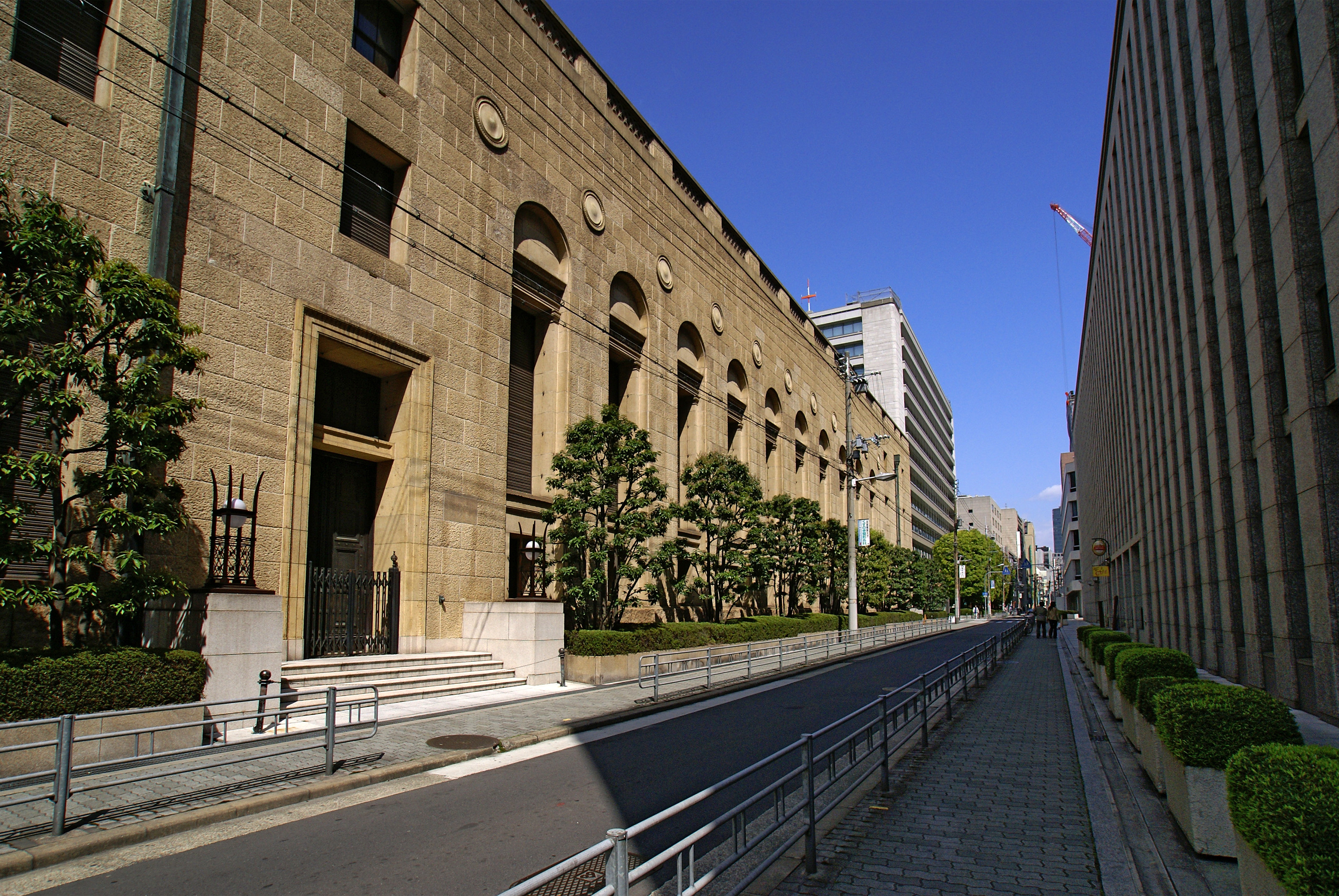 Sumitomo building in Osaka, Osaka prefecture, Japan